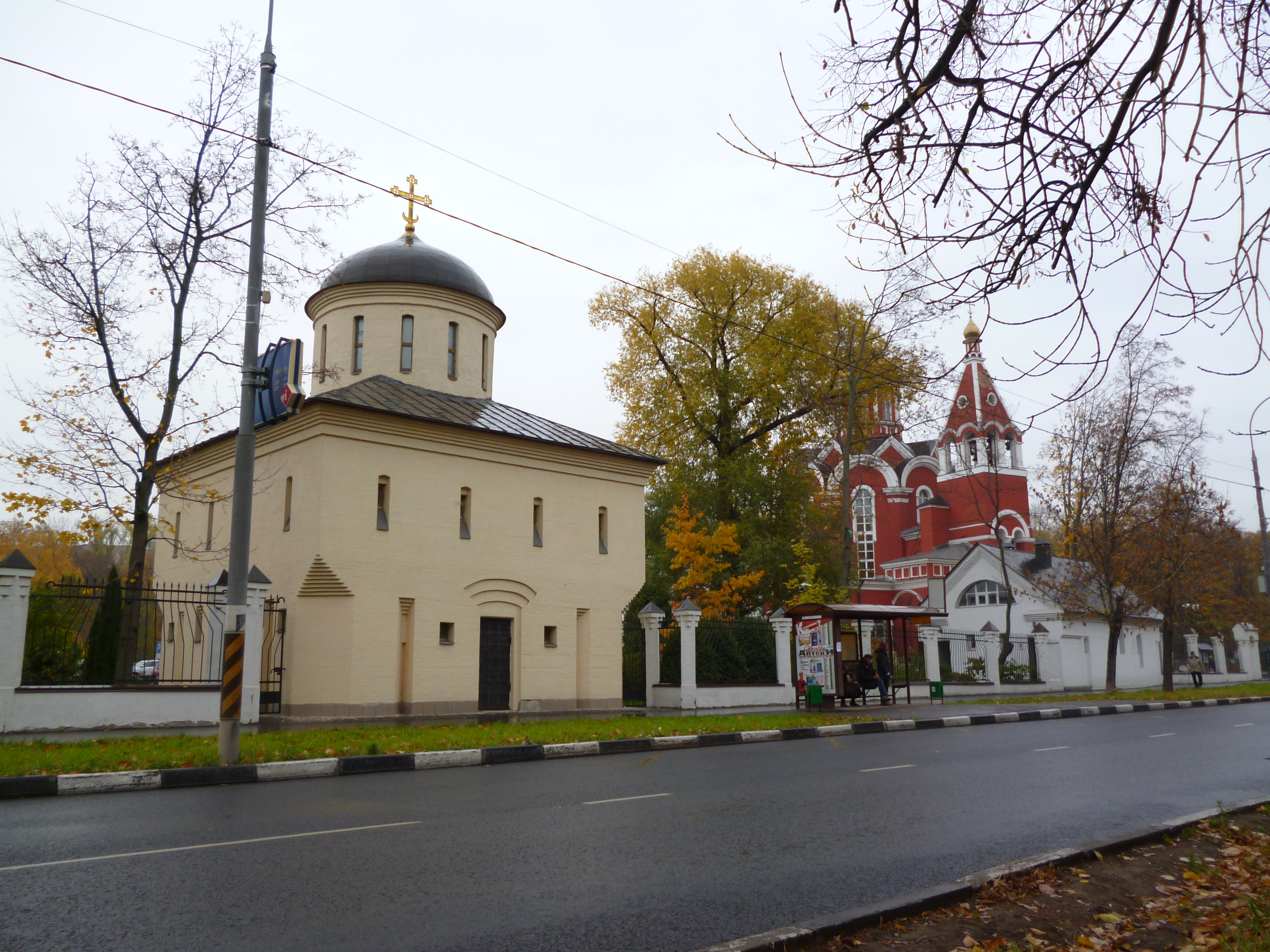 Церковь Благовещения в Петровском парке (Москва и Московская область, Москва, Красноармейская улица, 2-а)